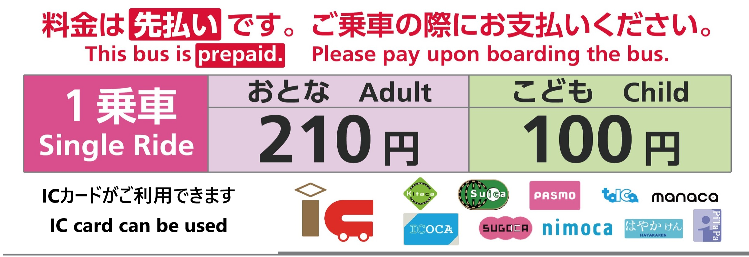 名古屋市内を運行する市バス観光ルートバス共通です